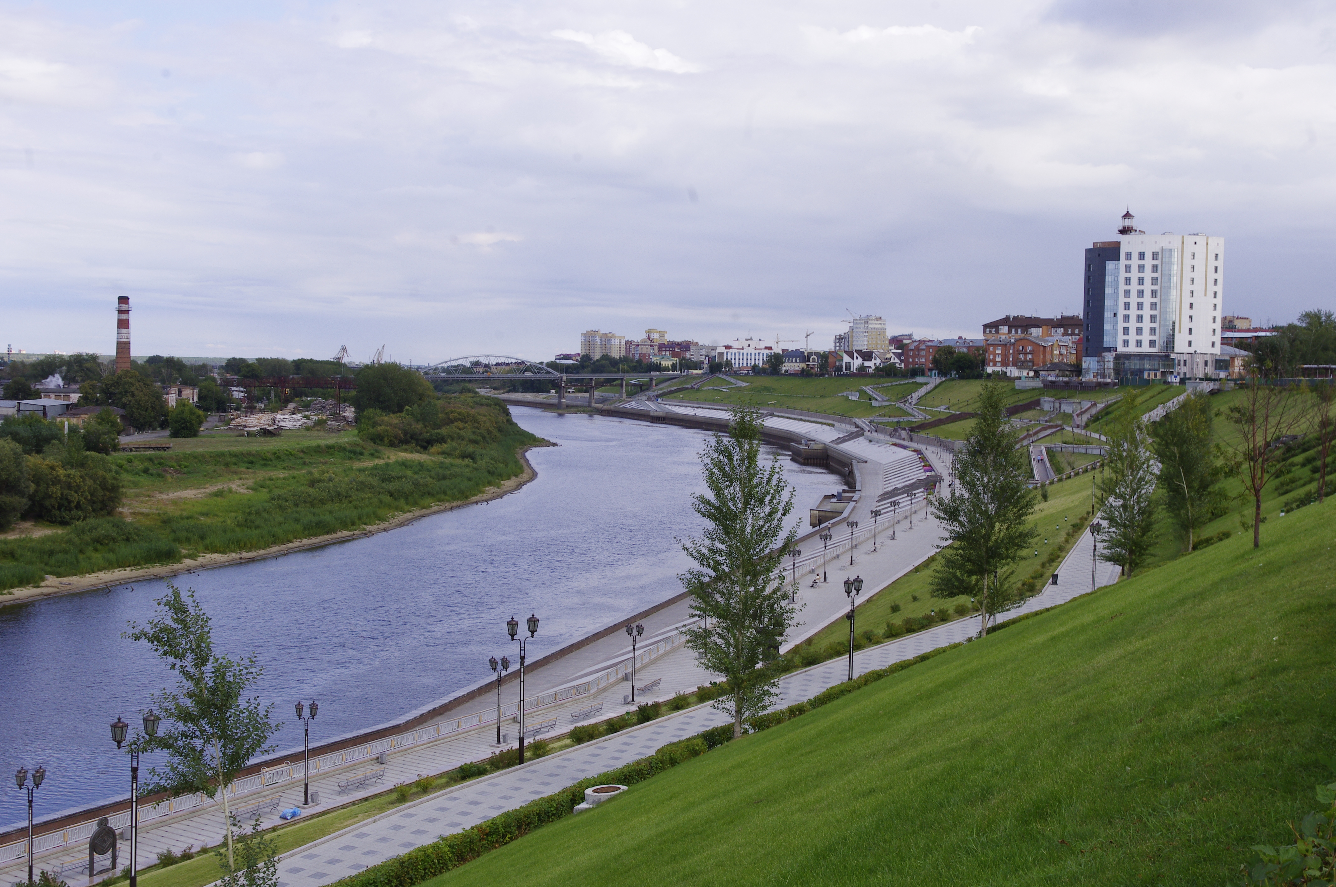 Lato 2013.